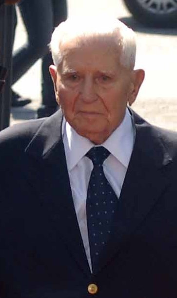 Rondon Pacheco chega ao Palácio da Liberdade para almoço em comemoração a seu aniversário de 90 anos.